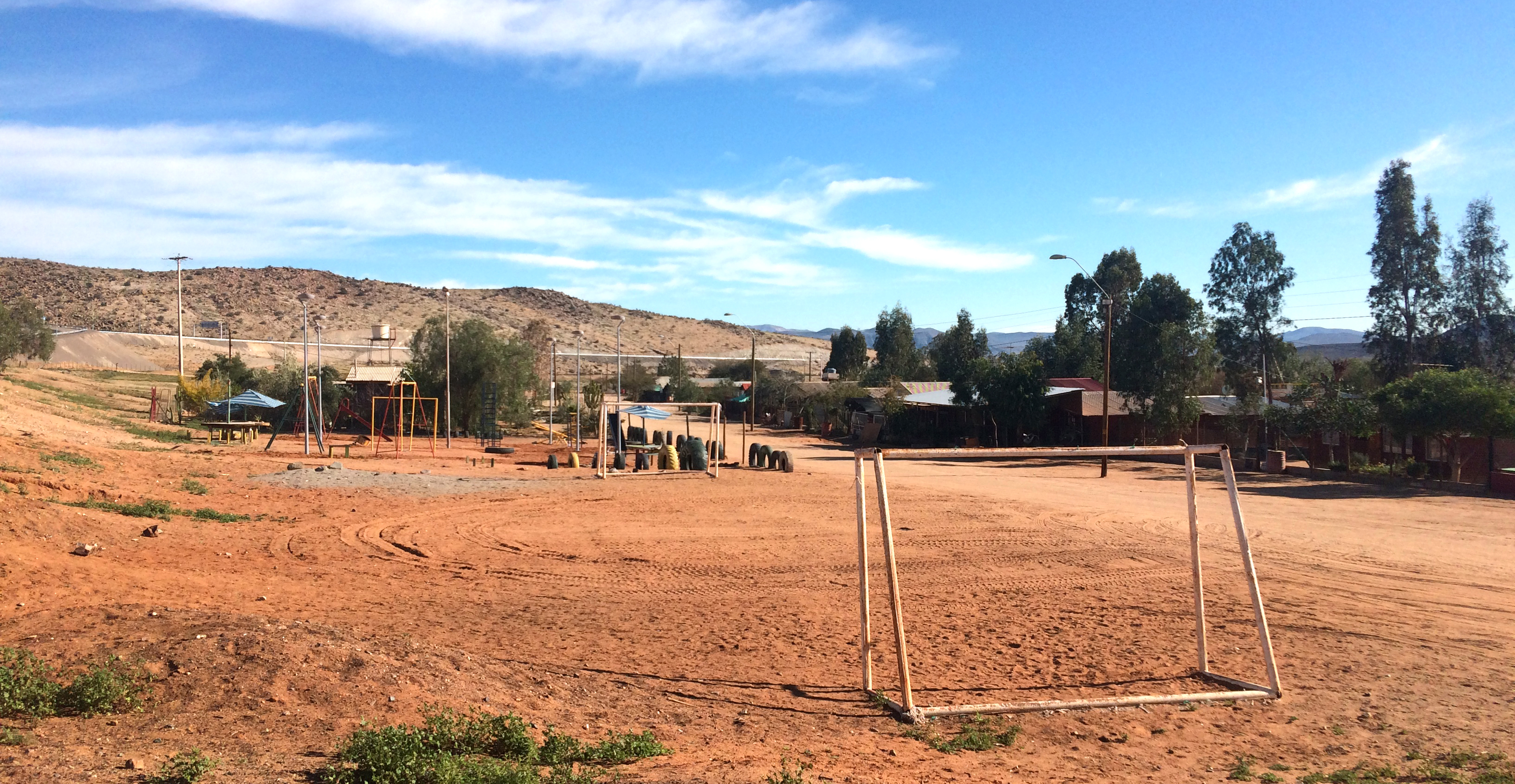 Lugar de esparcimiento y encuentro